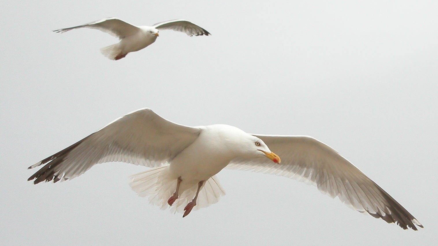 Un goéland argenté presque de face en vol quasi stationnaire à cause d’un vent de face.